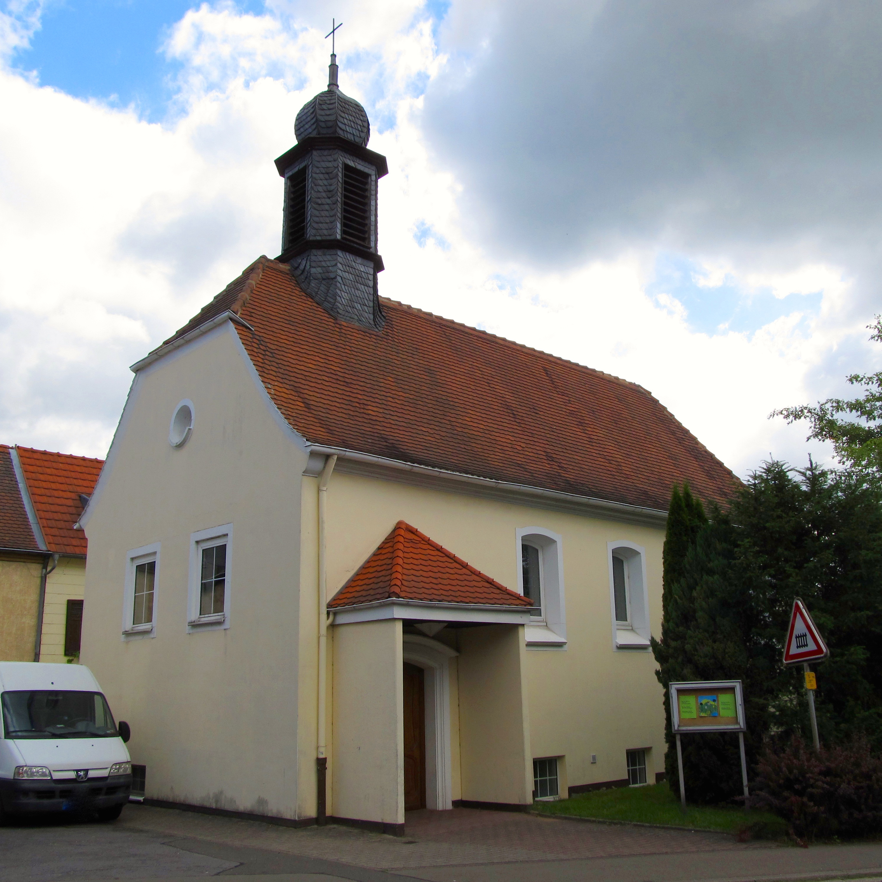 Protestantische Heiliggeistkirche in Niederwürzbach, einem Stadtteil von Blieskastel, Saarland